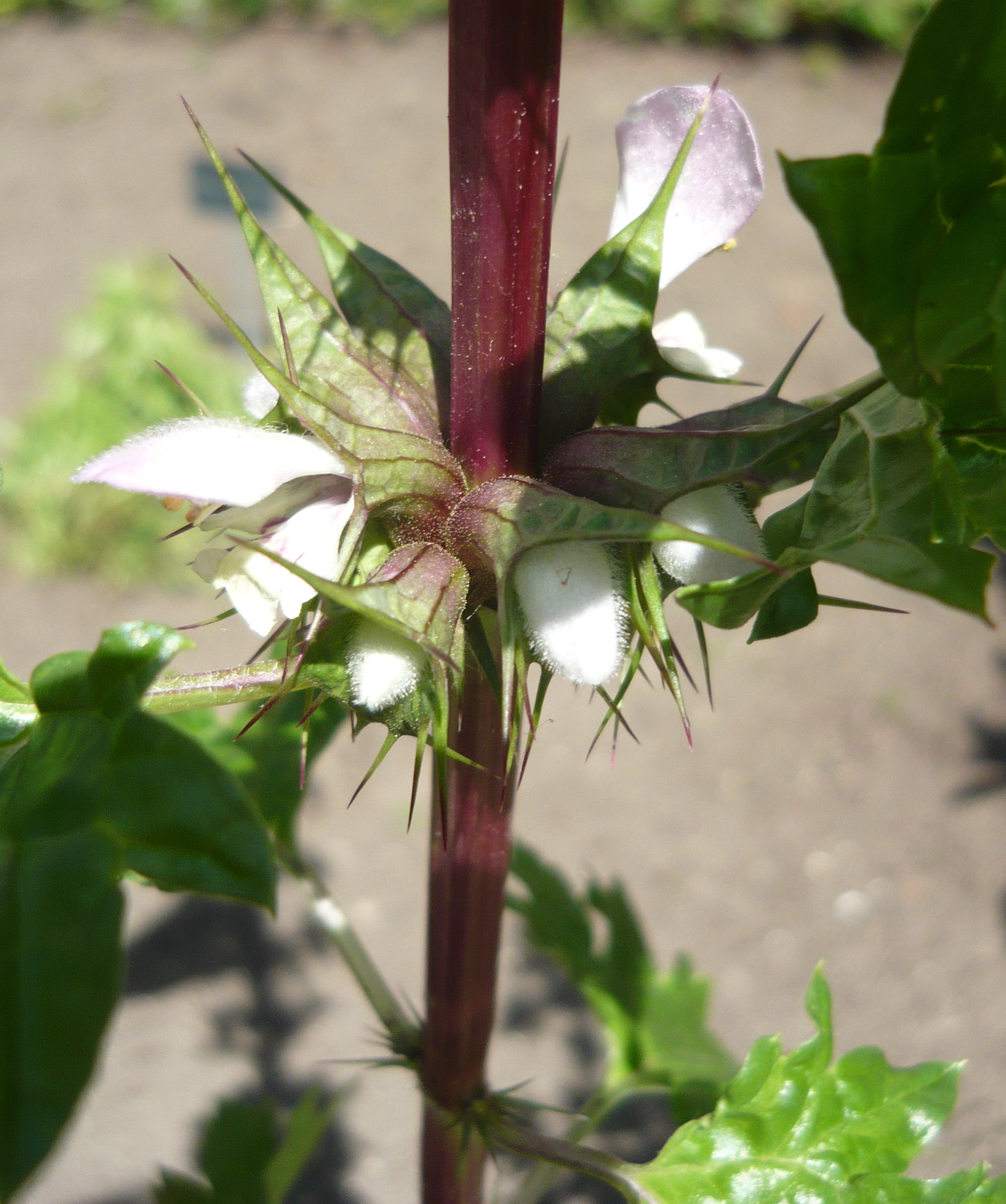 Moluccella spinosa, cultivada, Real Jardín Botánico, Madrid, España.